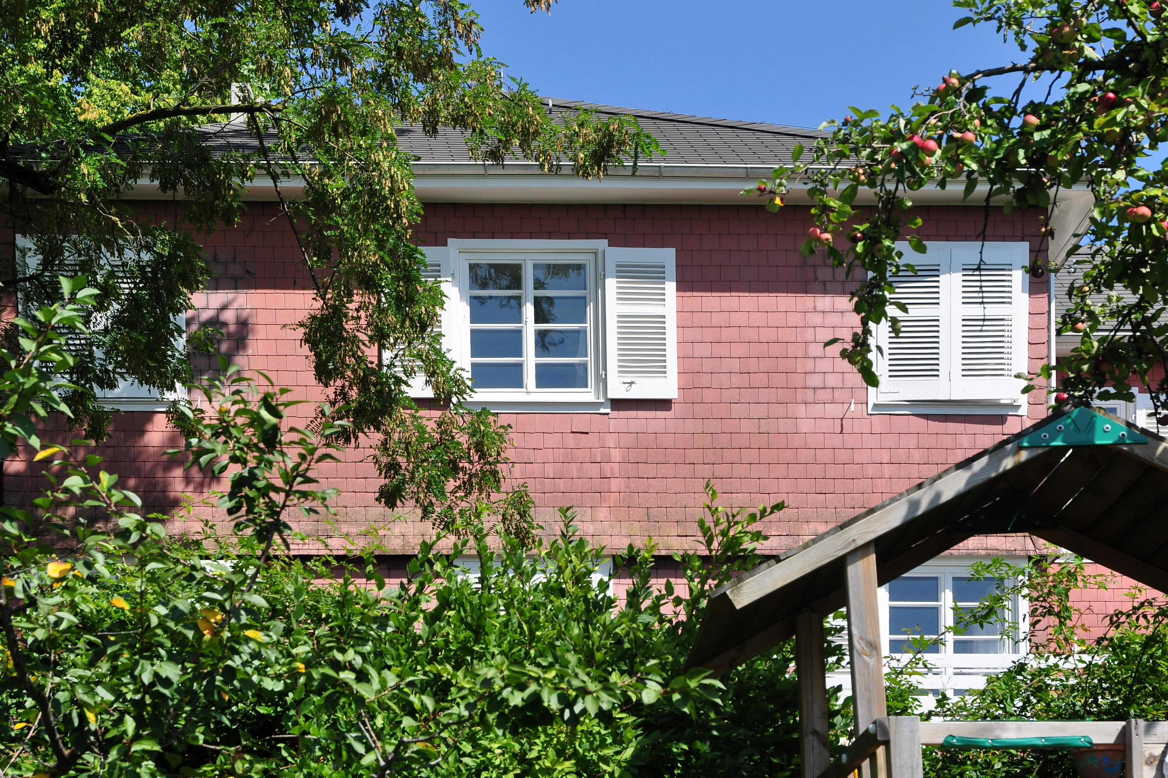 Eigenheim Lux Guyer ‹Sunnebüel›, Am Itschnacherstich 1 in Küsnacht (Switzerland)